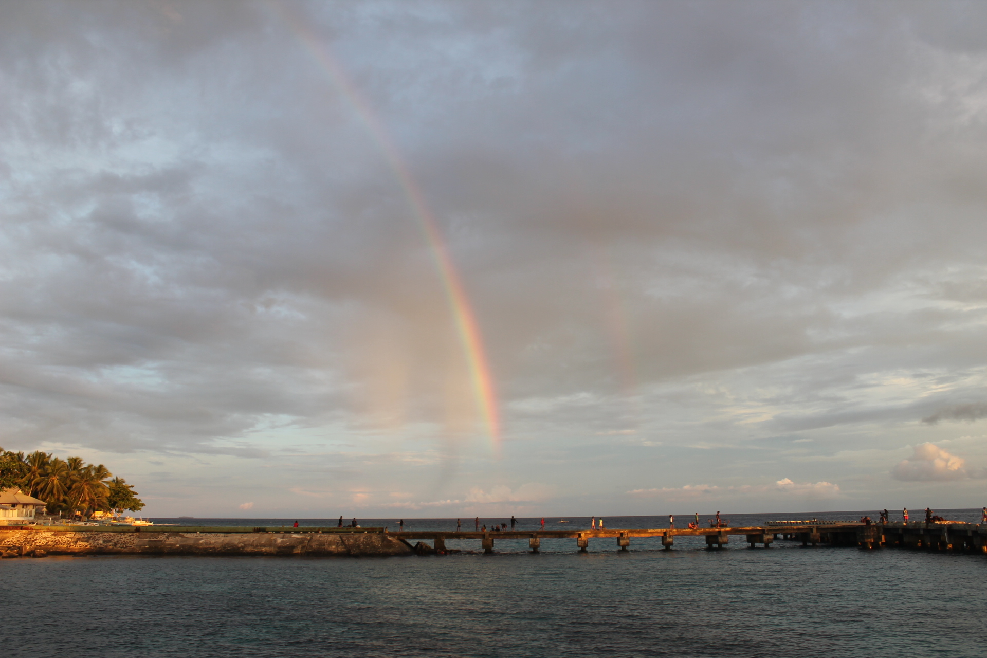 Pelangi setelah Badai